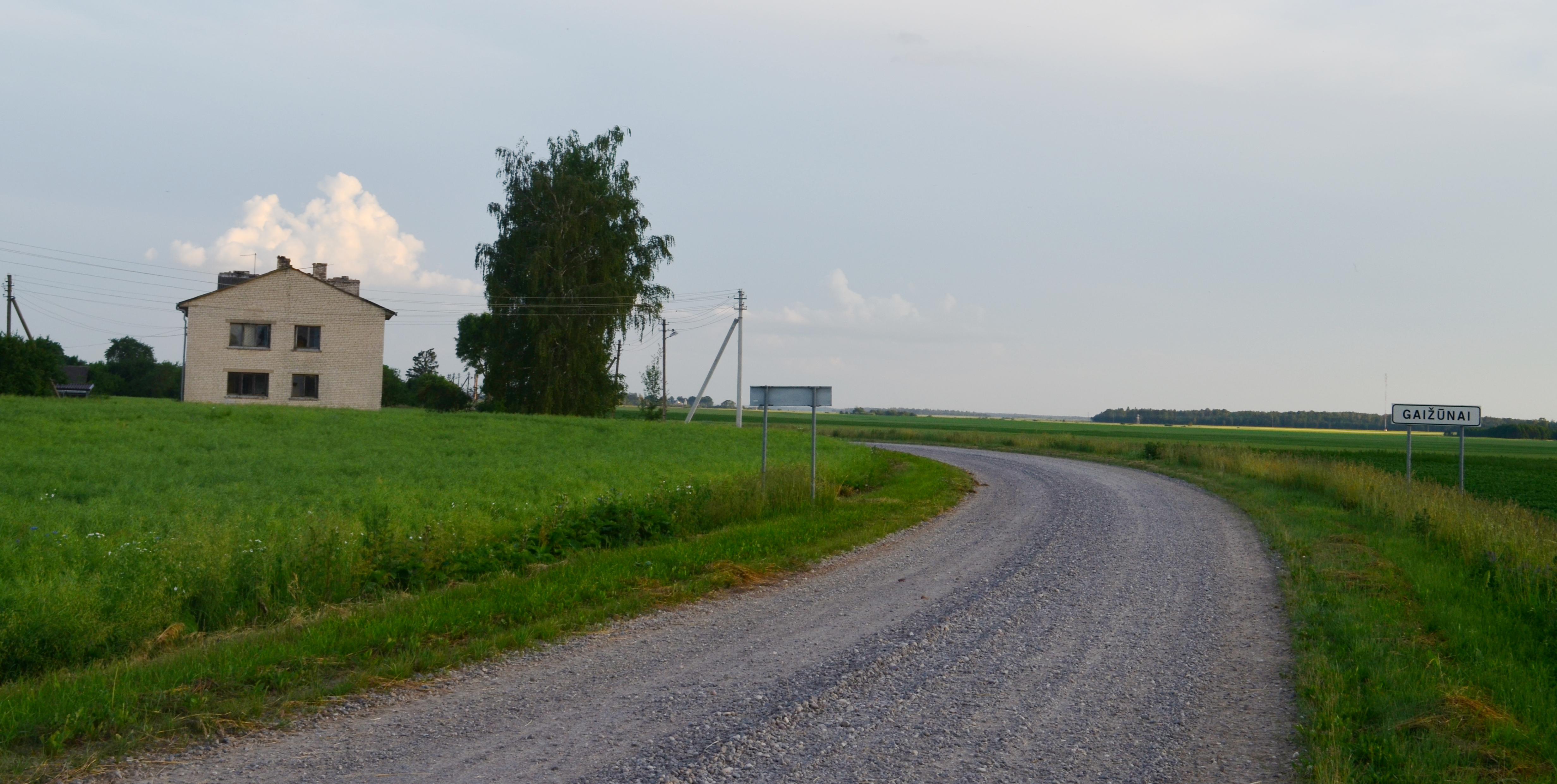 Gaižūnai, Bukonių s., Jonavos r.